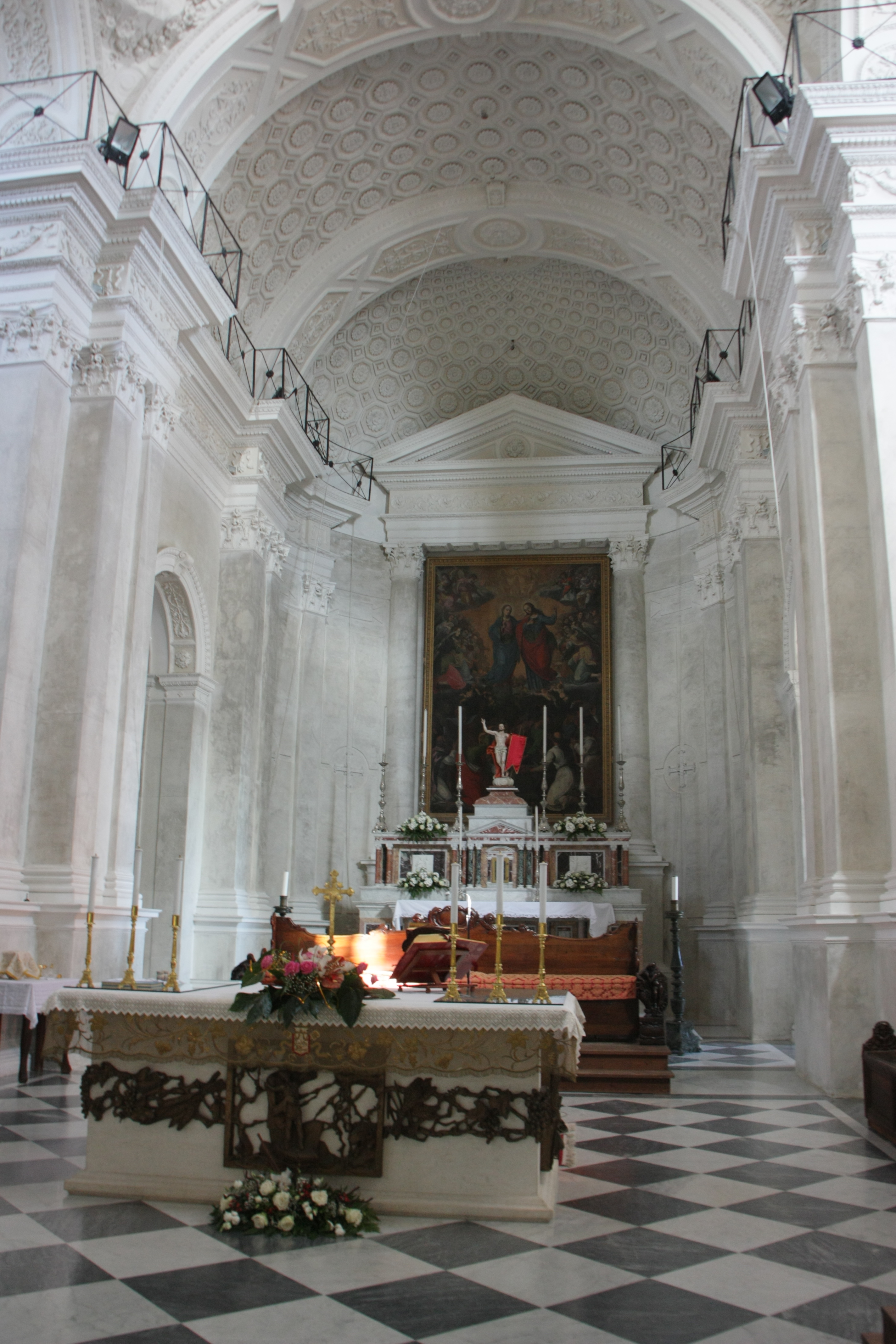 Chiesa Madre Calascibetta